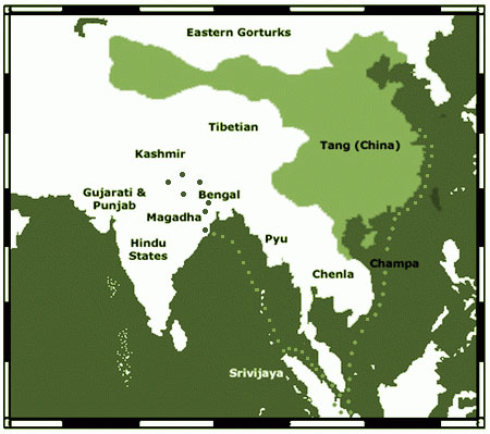 Map of I-Tsing.